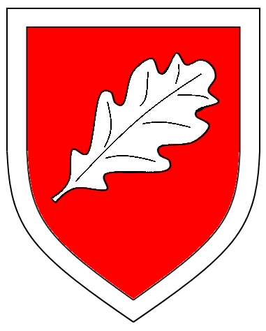 Truppenkennzeichen des I. Flak-Korps der deutschen Luftwaffe